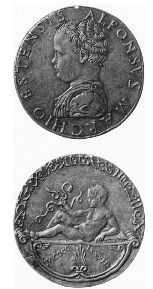 Abbildung von Alfonso I. d’Este als Kind (verso), auf der Rückseite Szene aus dem Leben Herkules (recto), ebenso als Kind